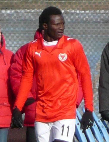 Abiola Dauda, Kalmar FF